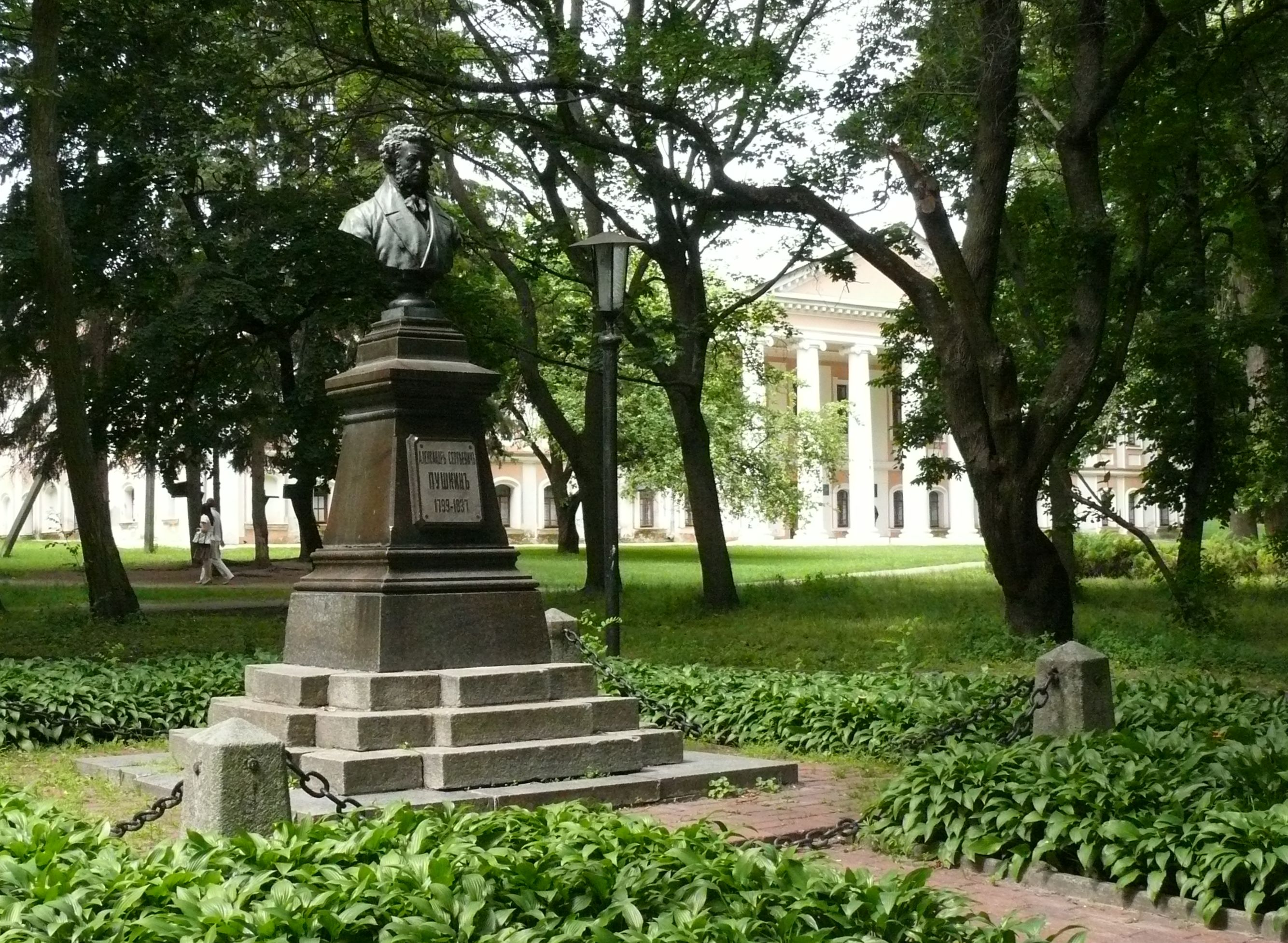 Памятник Александру Сергеевичу Пушкину, русскому поэту. Скульптор К. Берто, художник Г. Коваленко. 1900 год. На постаменте расположен бюст поэта, прикреплена табличка с надписью "АЛЕКСАНДР СЕРГЕЕВИЧ ПУШКИН 1799-1837", выполненной на кириллице с использованием букв "ять" и "ер". Расположен в ЦПКиО им. Коцюбинского города Чернигова. Украина.